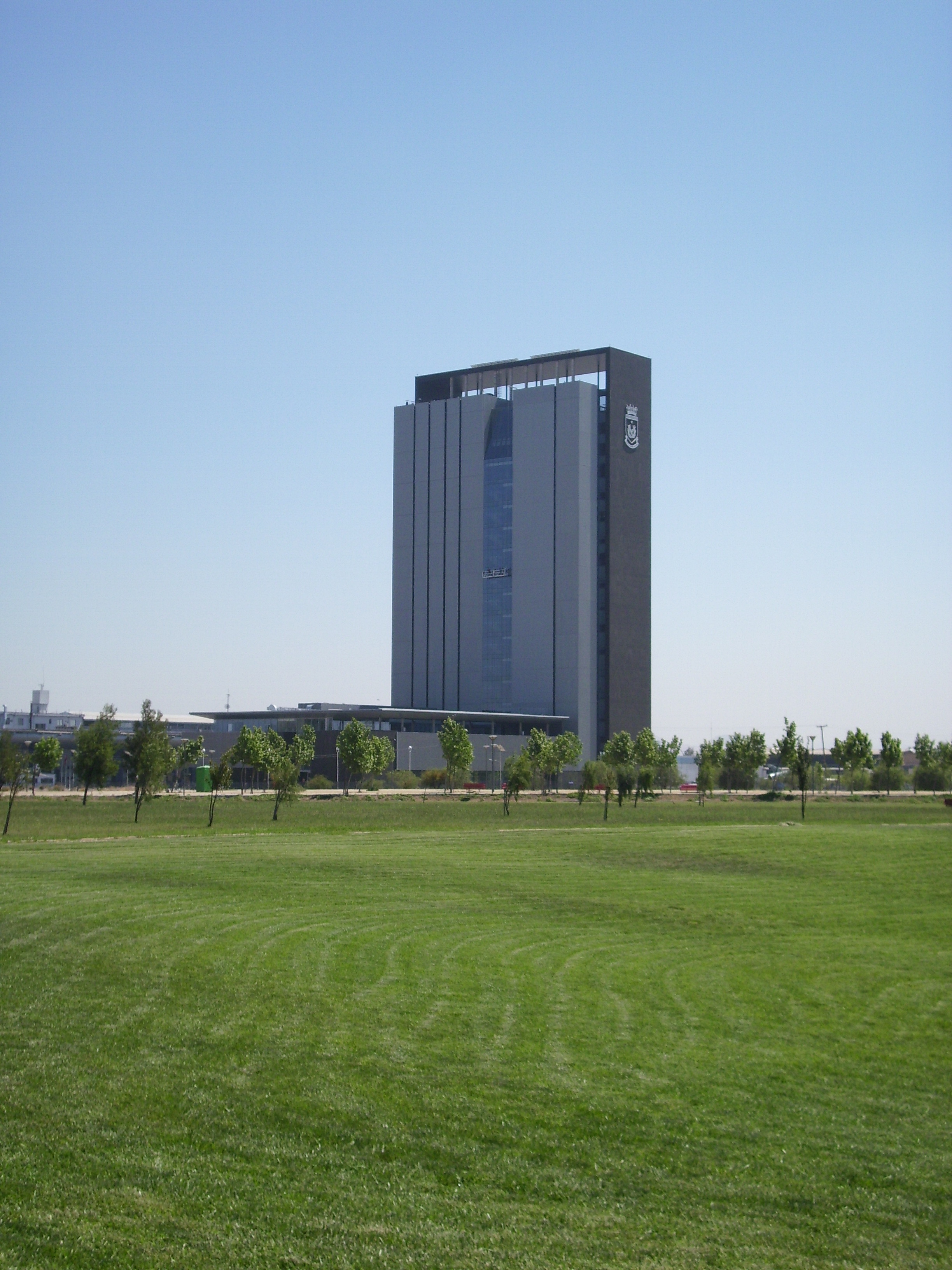 El edificio Delphos de la Fuerza Aérea de Chile visto desde el Parque Portal Bicentenario, en la comuna de Cerrillos, Santiago de Chile.